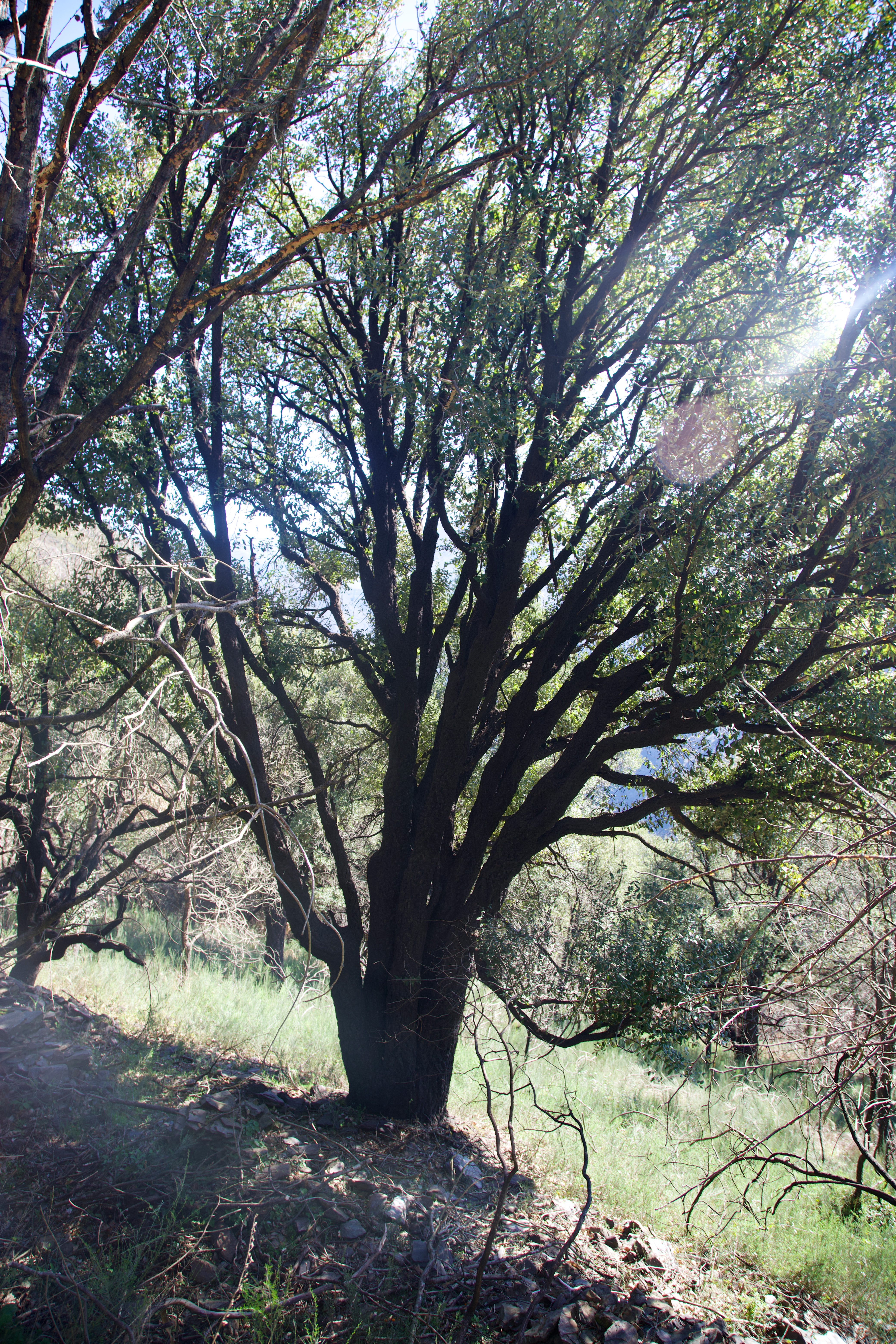 Alcornocal situado en el principado de Asturias. Espacio natural protegido y monumento natural